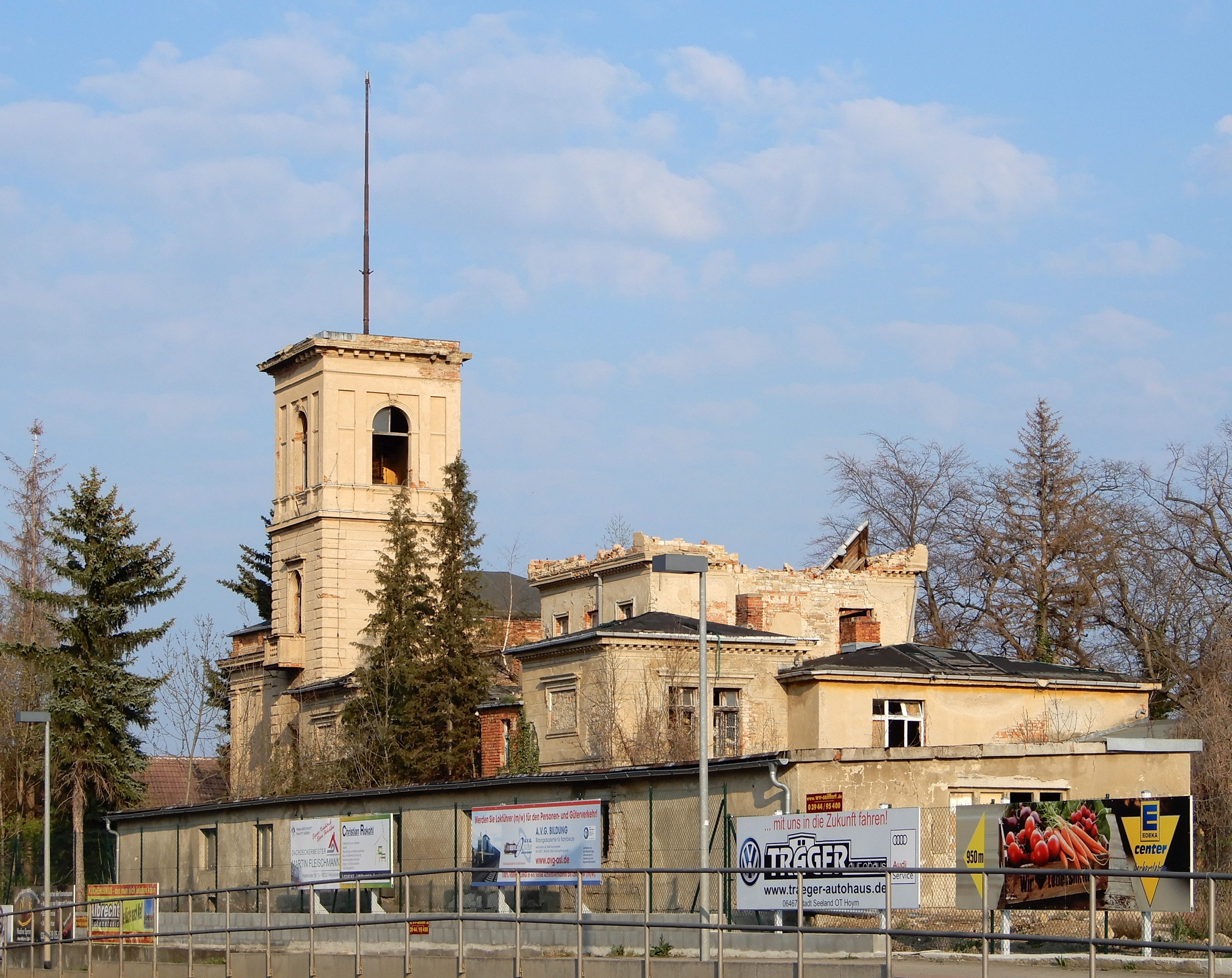 Gebäude Ermslebener Straße 10 in Aschersleben, Graf-Douglas-Villa